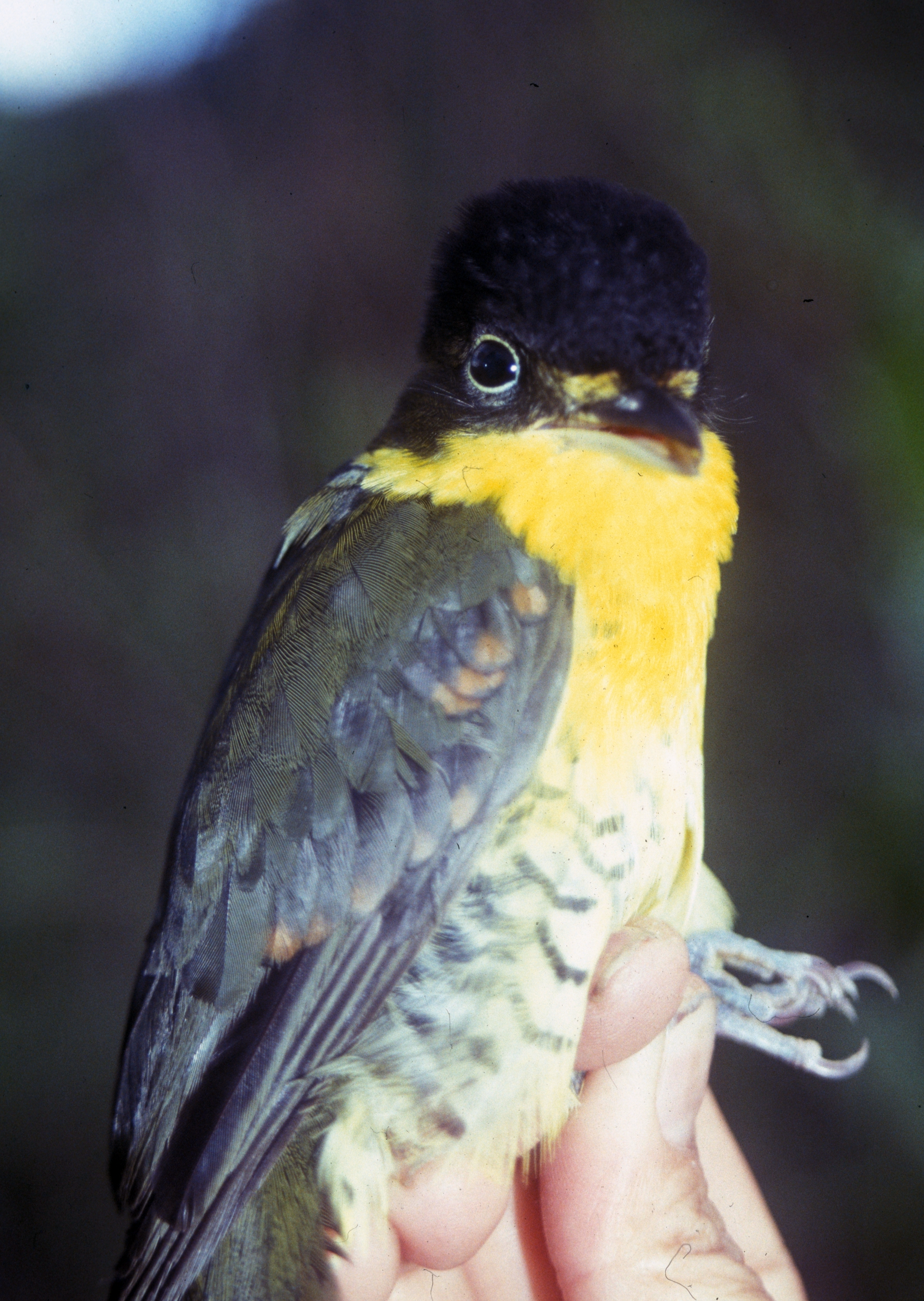 male Shrike-like Cotinga (Laniisoma elegans buckleyi) in Ecuador